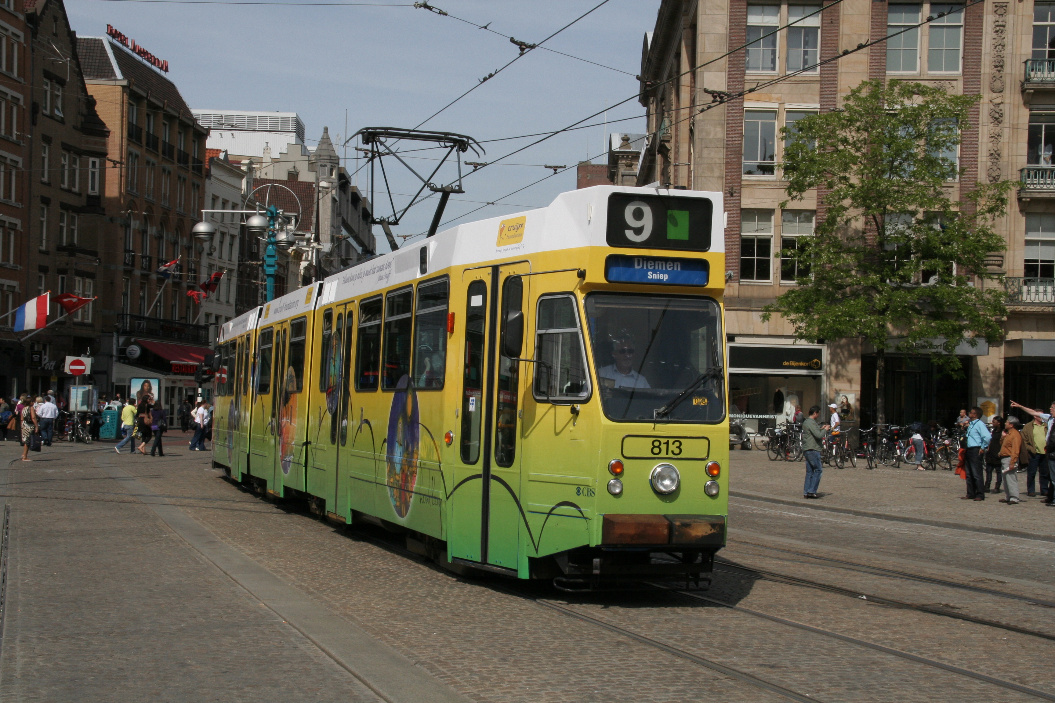 De GVB 813 met totaalreclame voor de Johan Cruyff-foundation op de Dam.